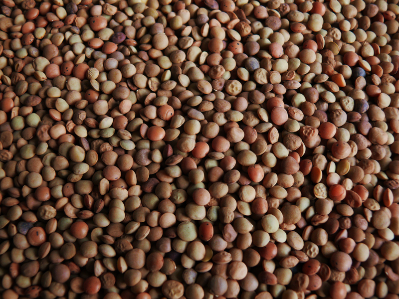 Lenticchie di Castelluccio